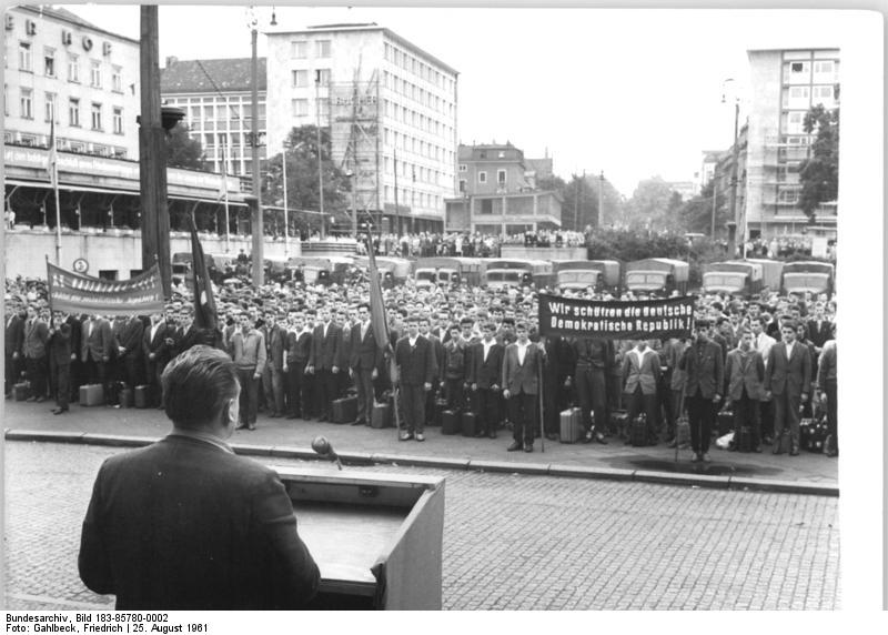 ADN-ZB-Gahlbeck-In Karl-Marx-Stadt wurden 500 Freiwillige, die dem Aufruf der FDJ "Das Vaterland ruft! Schützt die sozialistische Republik!" gefolgt sind, am 25.8.1961 verabschiedet. Sie werden im Regiment "Karl-Marx" der NVA ihren Dienst tun. "